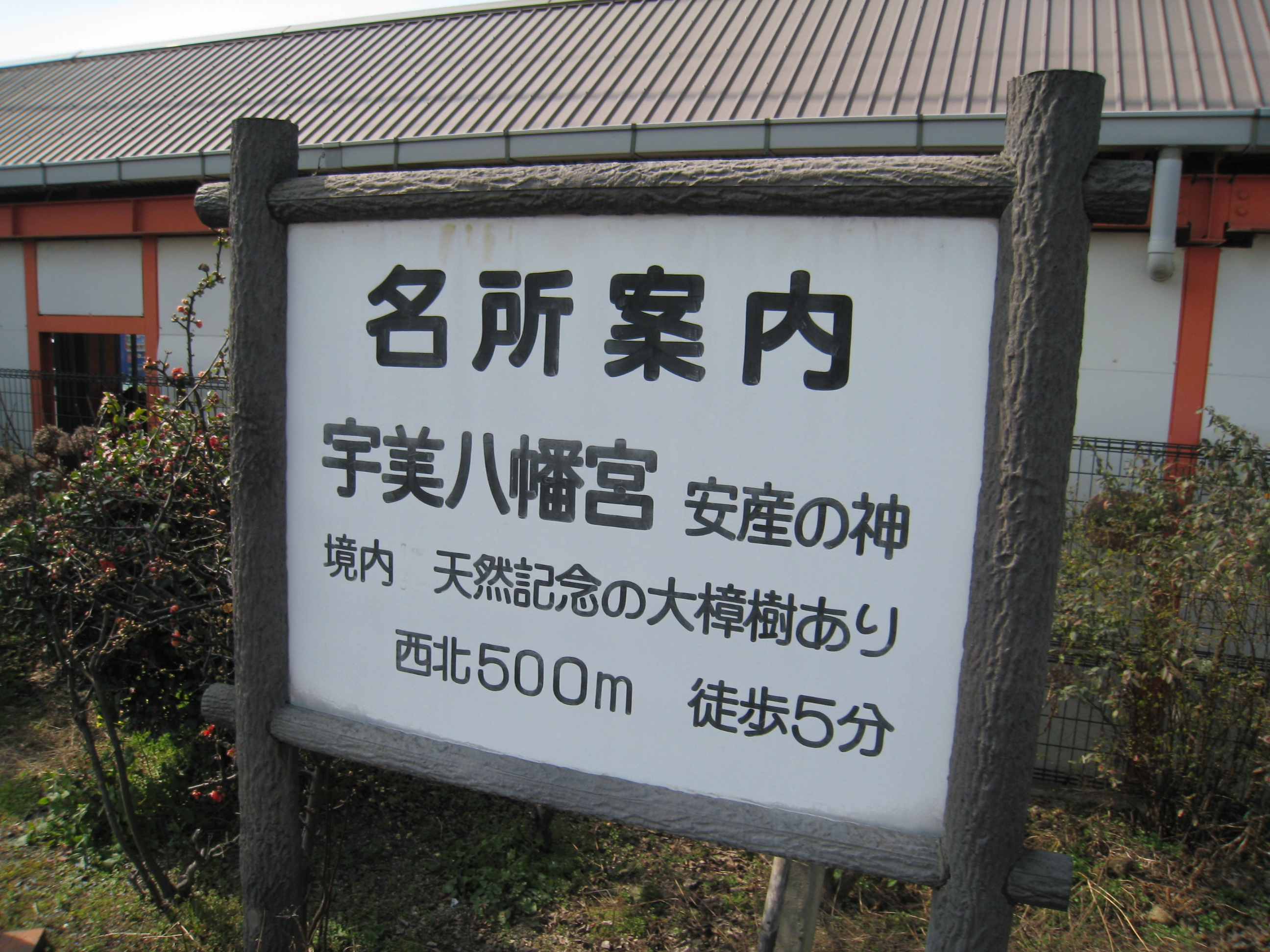 宇美駅 名所案内